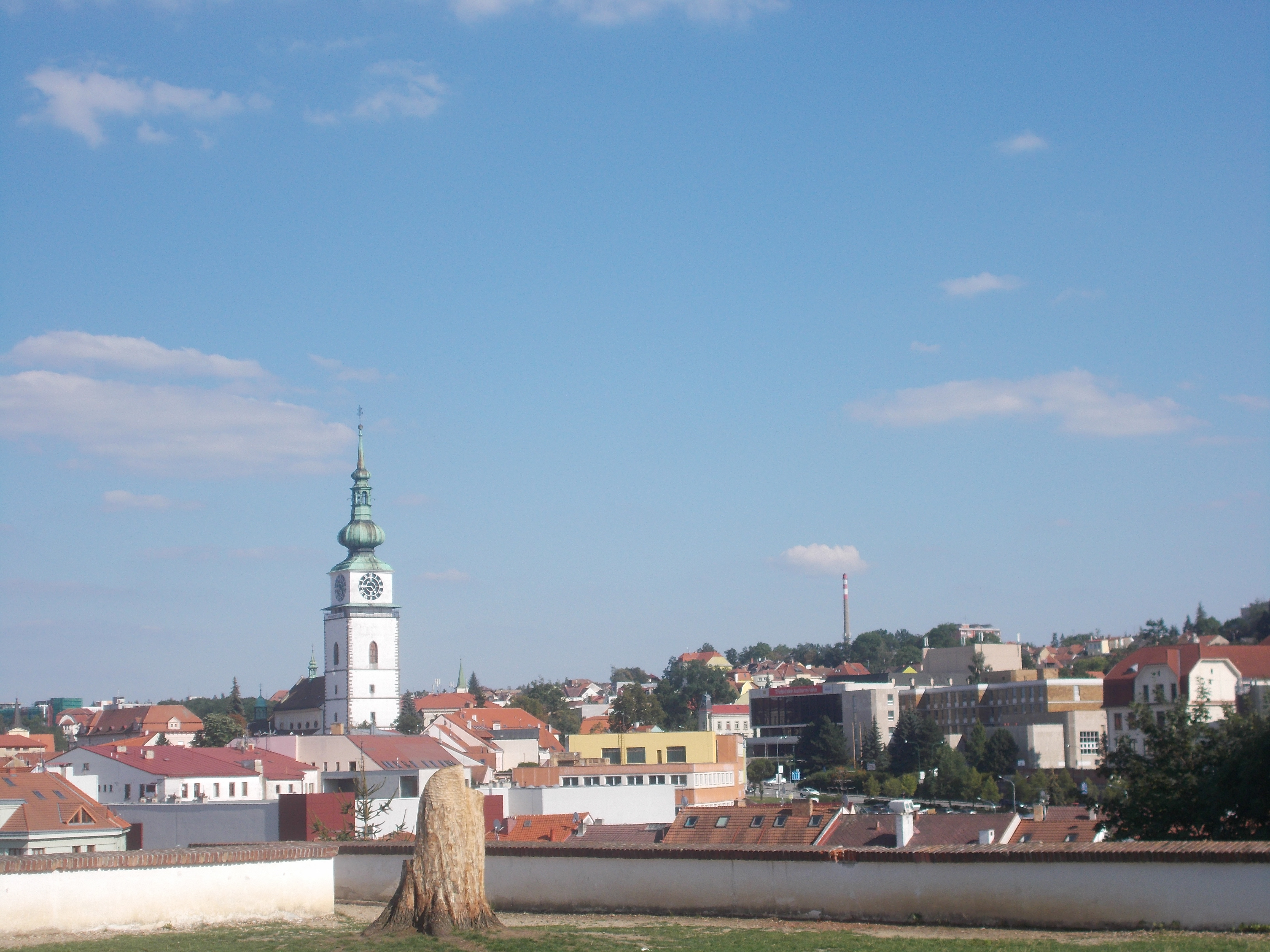 Třebíč látképe a Szent Procopius-bazilikától